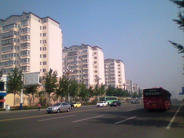 中文（中国大陆）: 河北省唐山市